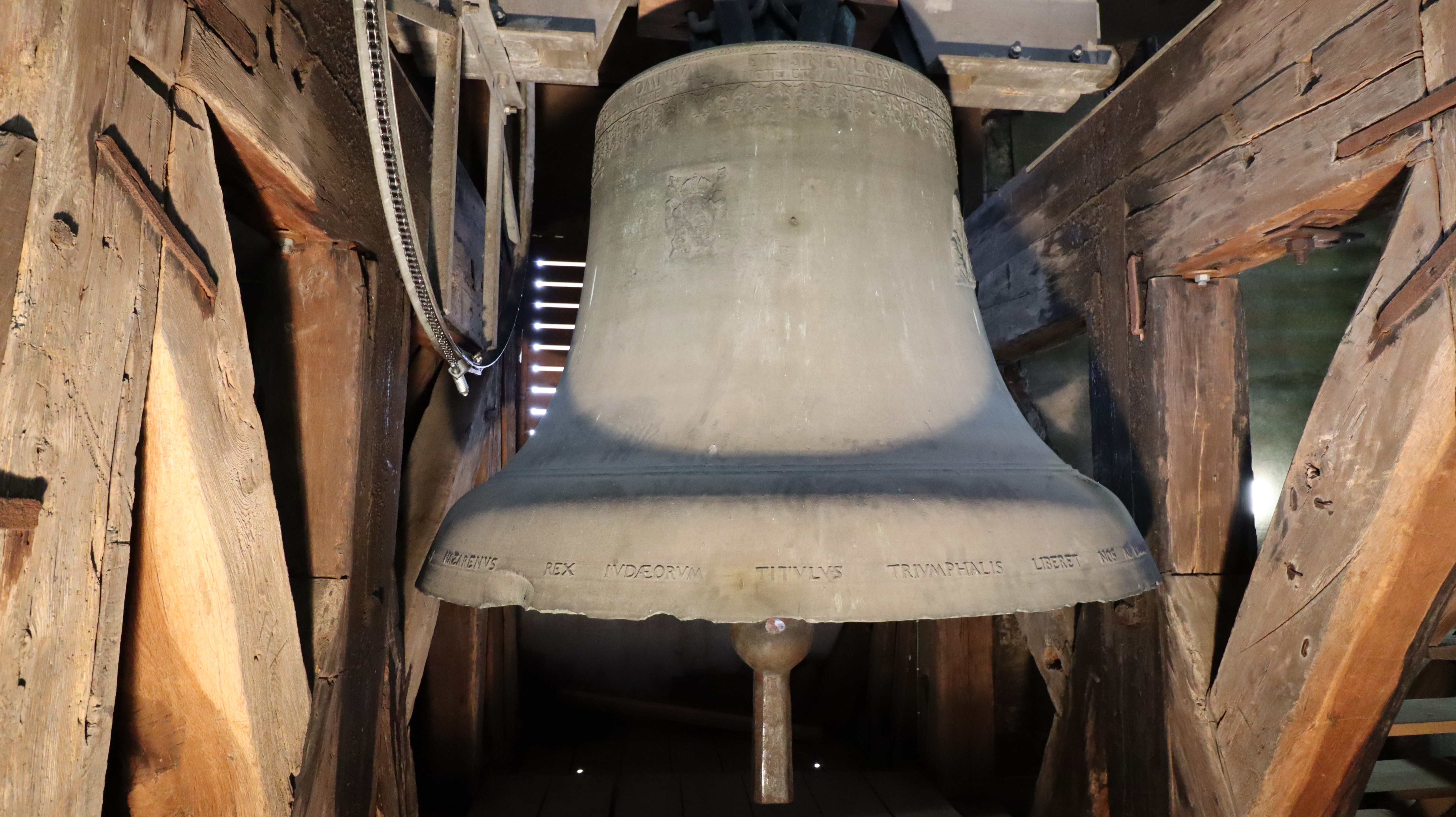 Die größte Glocke der Martinskirche.